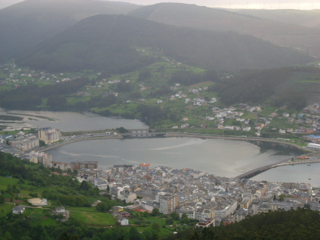 Viveiro (zona da Variante)